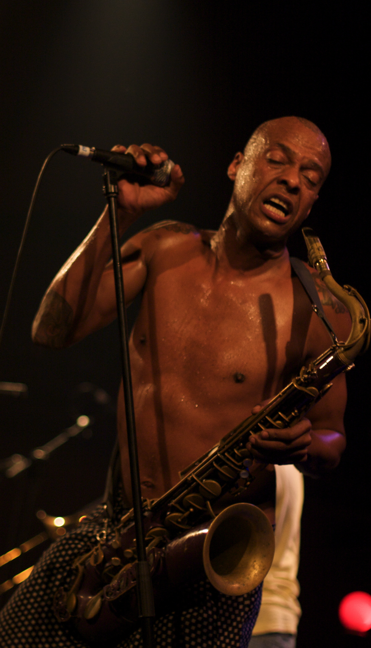 Fishbone en concert à la salle Apolo de Barcelone (Espagne).